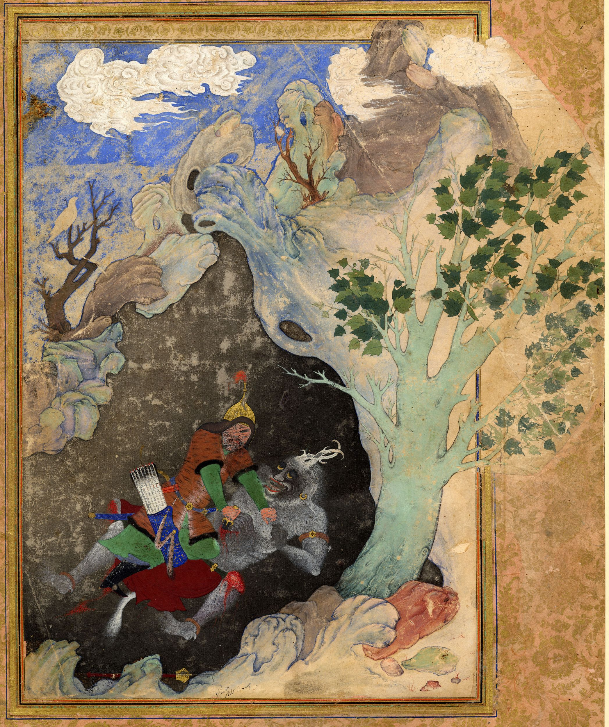 Рустам, убивающий белого дива. «Шахнаме» Исмаила II. Казвин. 1576-77гг. Британский музей, Лондон